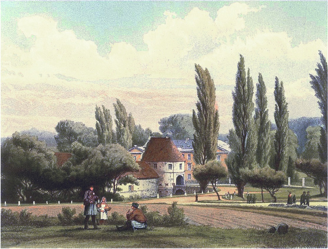 Schloss Brünninghausen mit dem Torhaus in der Bildmitte